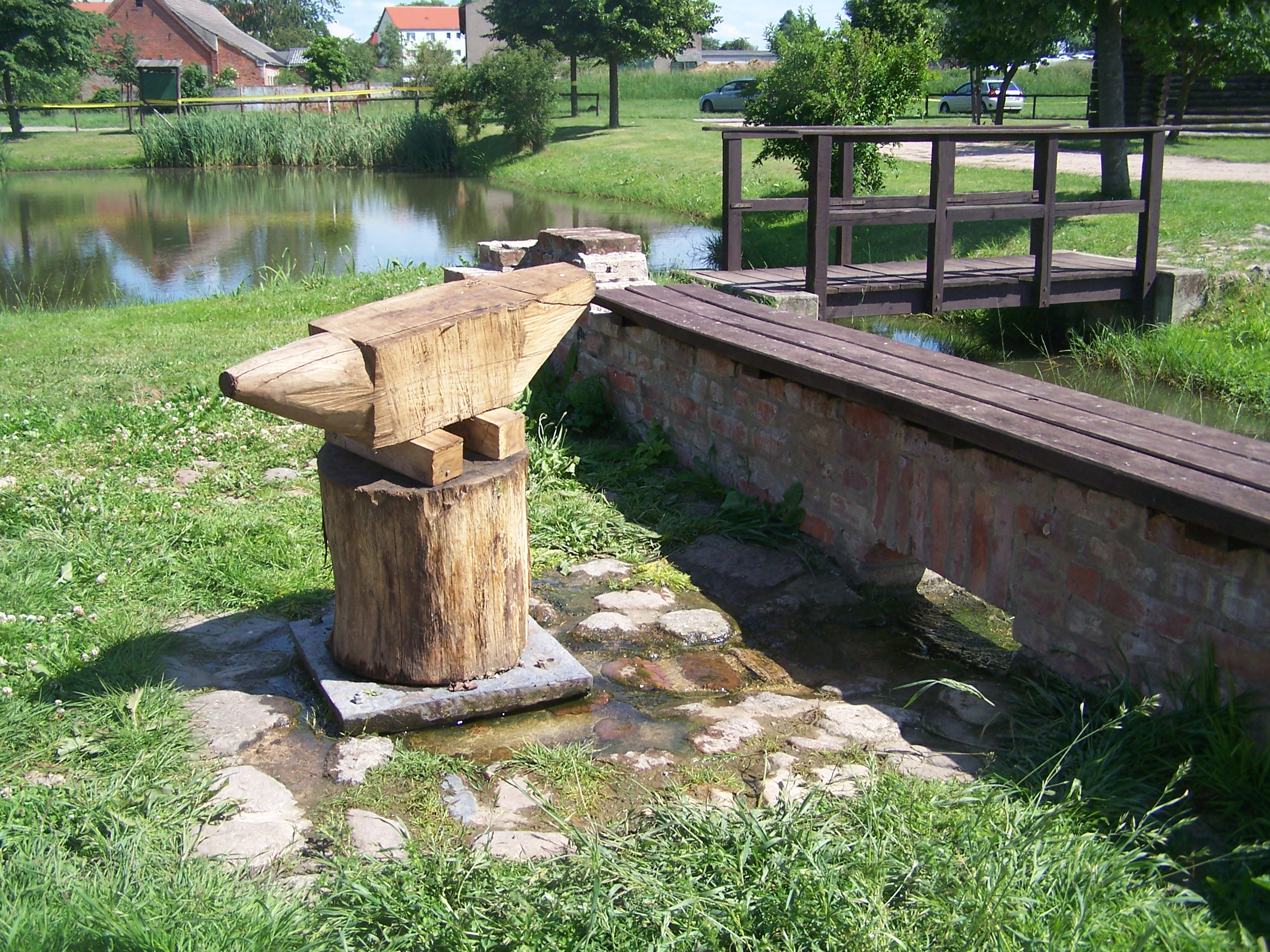 Quelle der Warnow in Grebbin. Angeblich stand eine Schmiede auf der Quelle.